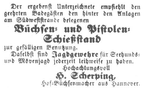 Inserat mutmaßlich aus dem Badekurier von 1880, dem Informationsblatt für die Insel Norderney. Hier warb der Hof-Büchsenmeister Heinrich Scherping: Der ergebenst Unterzeichnete empfiehlt den geehrten Badegästen den hinter den Anlagen am Südweststrande belegenen Büchsen- und Pistolen- Schießstand zur gefälligen Benutzung. Daselbst sind Jagdgewehre für Seehunds- und Mövenjagd jederzeit leihweise zu haben. Hochachtungsvoll H. Scherping, Hof-Büchsenmacher aus Hannover ...